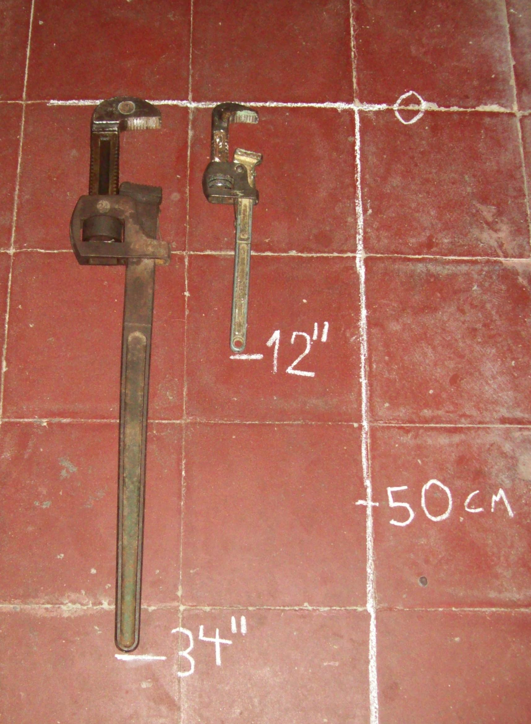 Es una foto de dos llaves Stillson, la más grande es de 34 pulgadas, y la más chica es de 12 pulgadas.